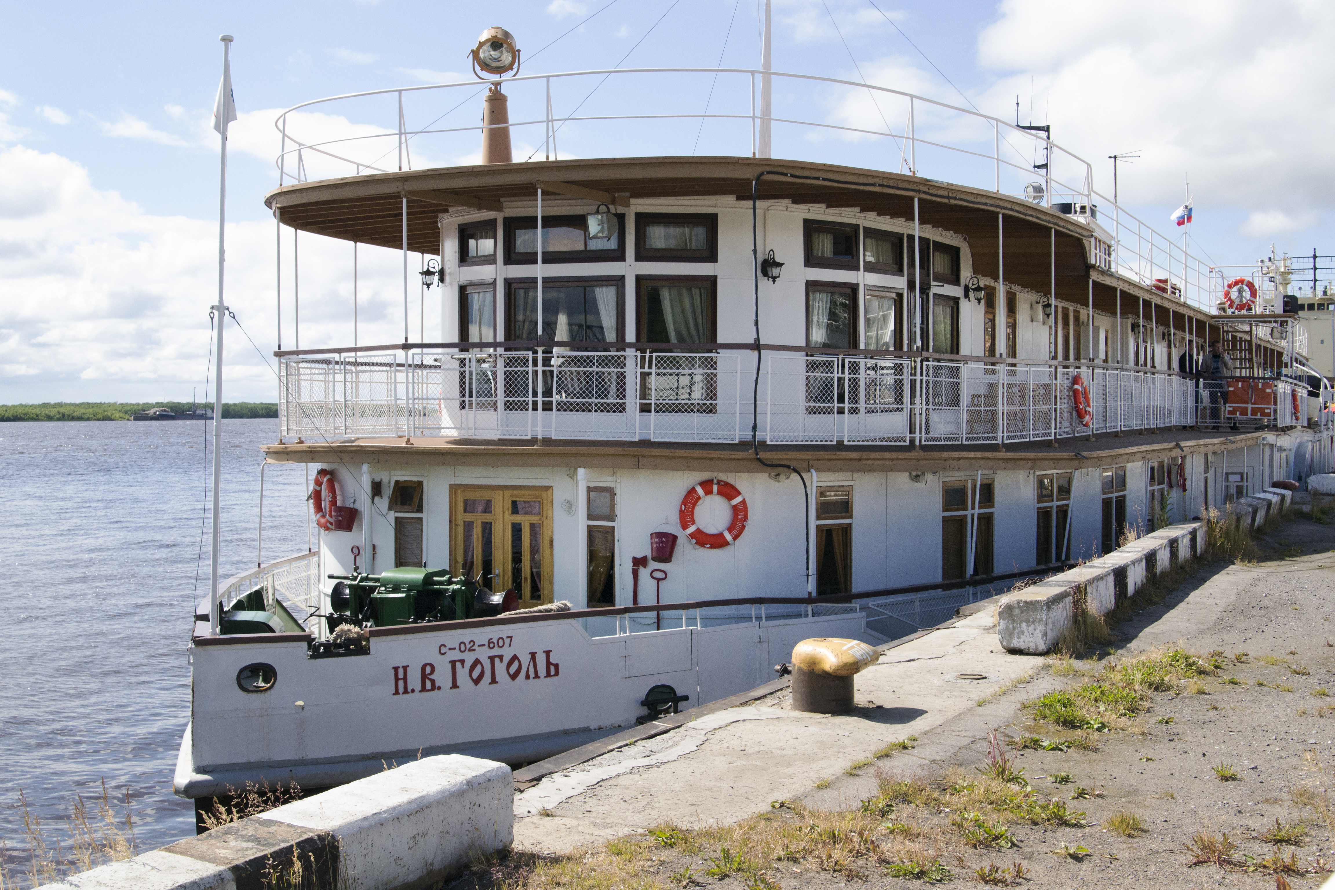 Пароход-колесник "Н.В. Гоголь": Северодвинск, Архангельская область